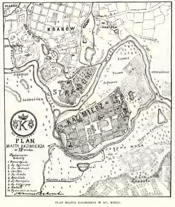 Plan miasta Kazimierza w XV wieku